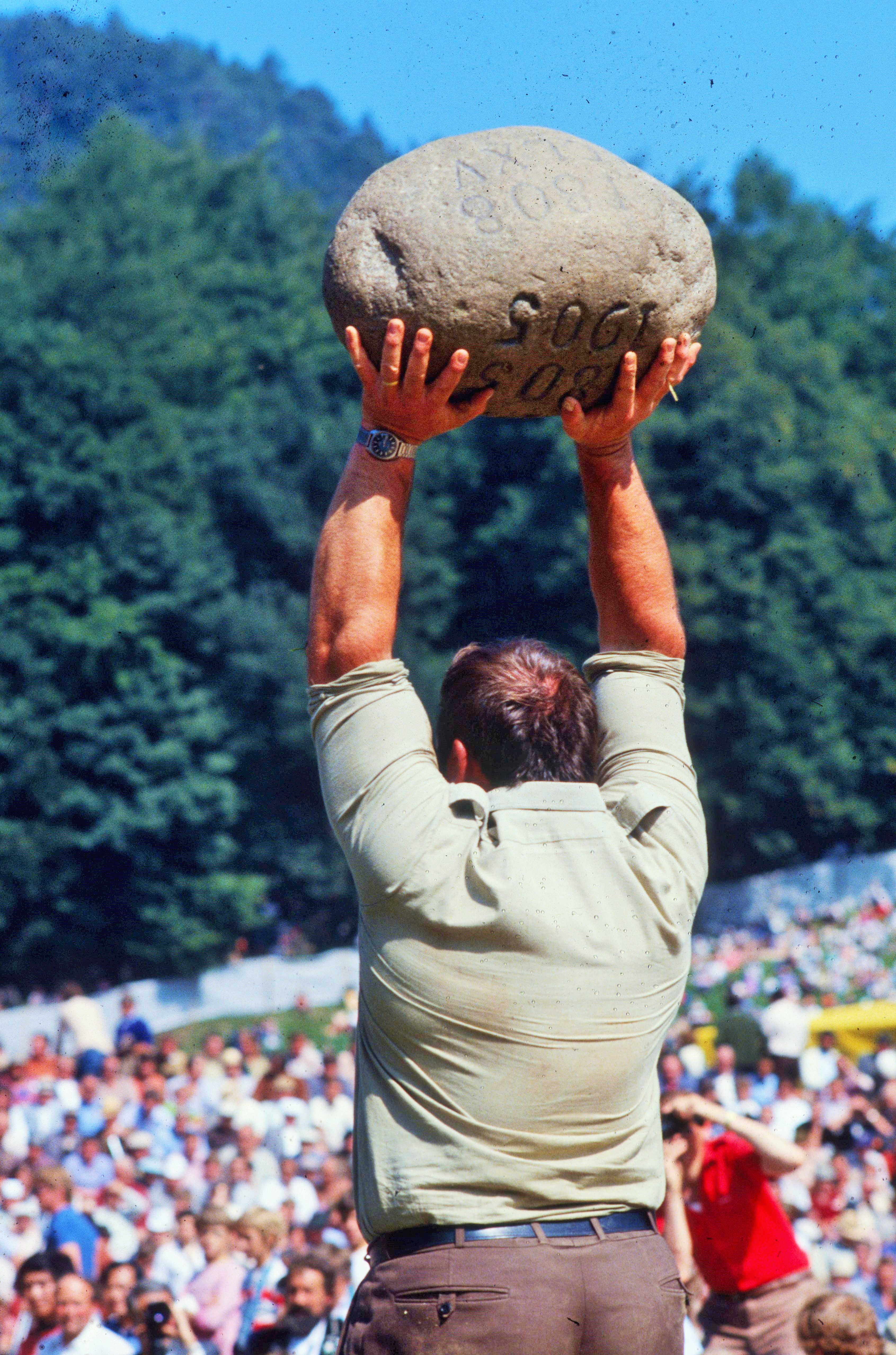 Unspunnenfest 1981, Schweiz